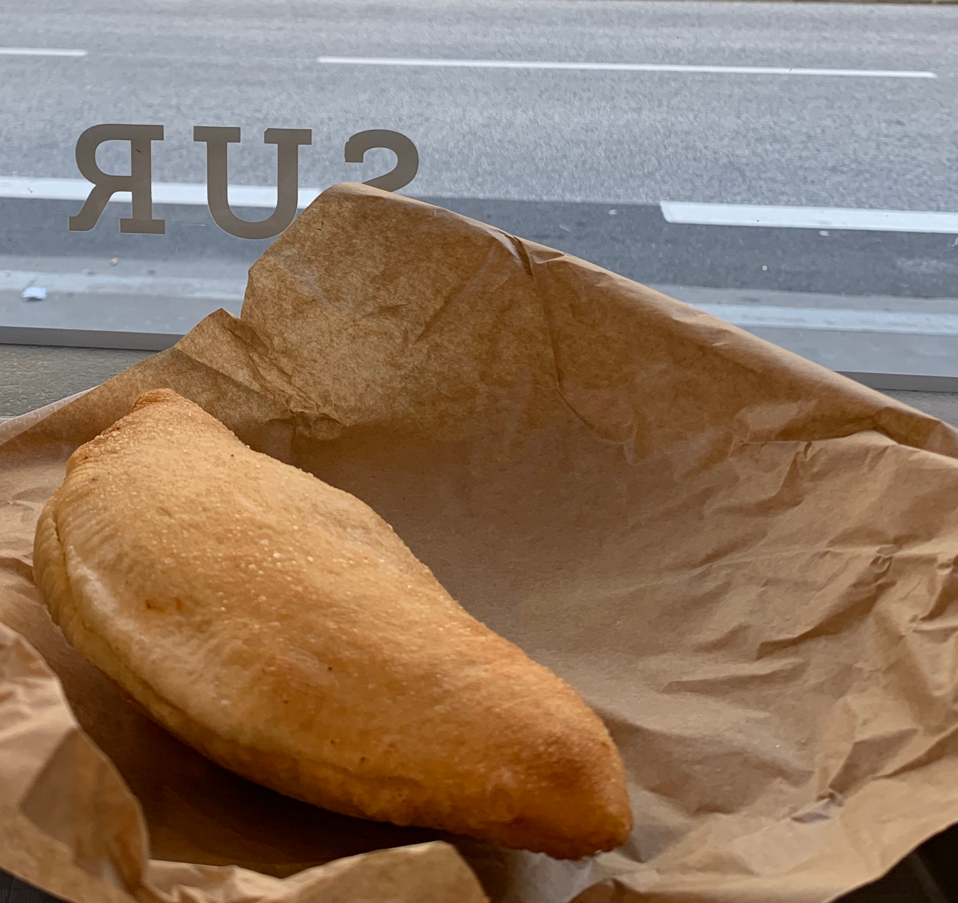 Un panzerotto à Lyon (février 2019).